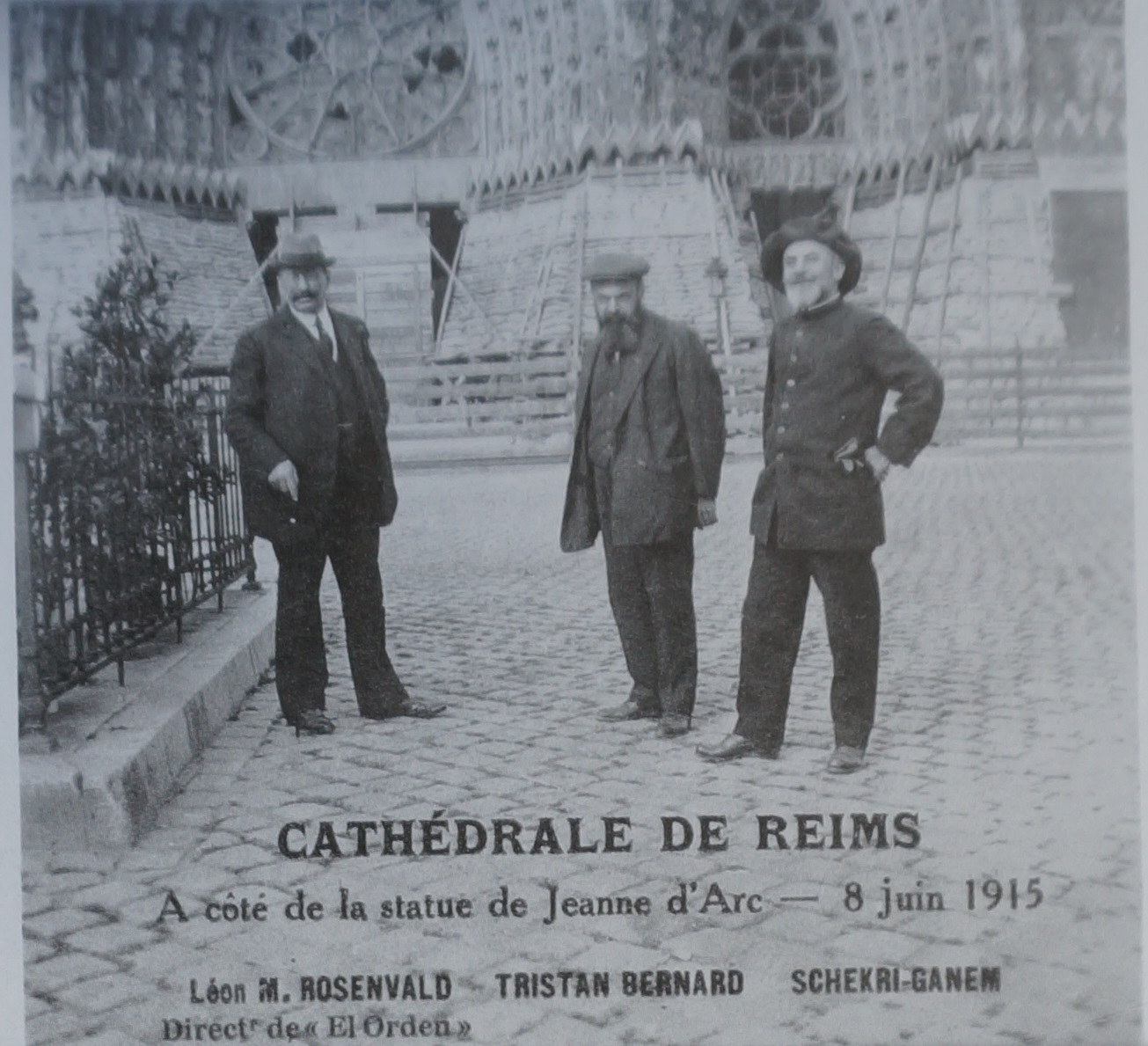 carte postale de Reims.